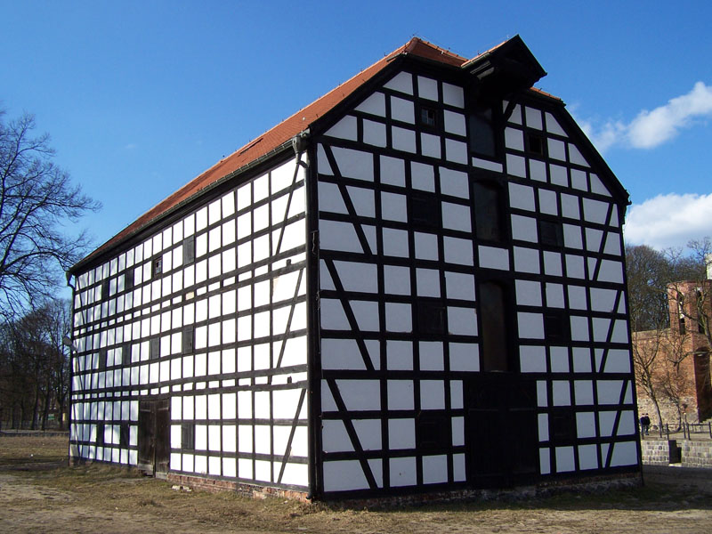 Spichlerz w Goleniowie